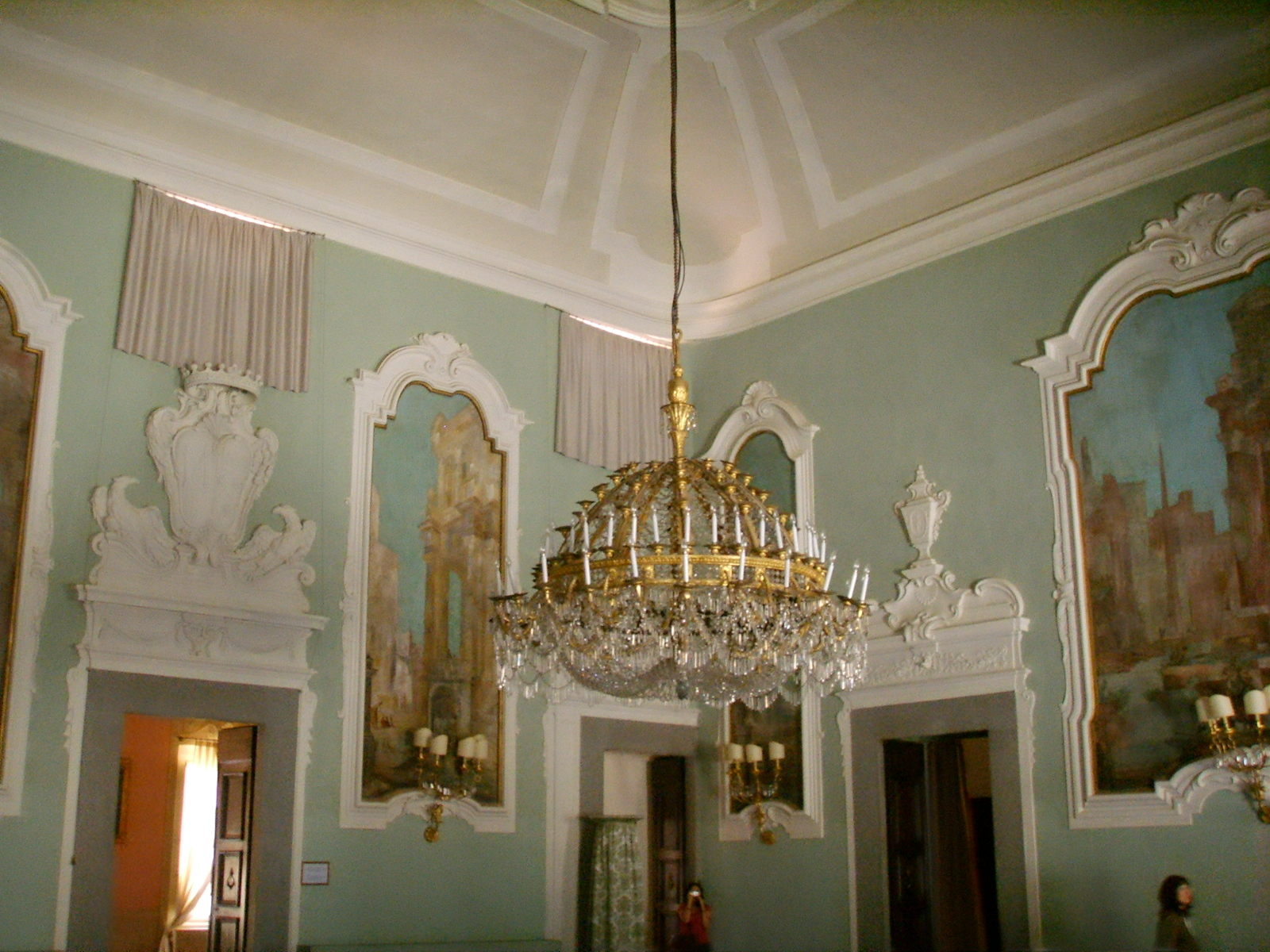 Palazzo Ximenes panciatichi da sangallo, salone